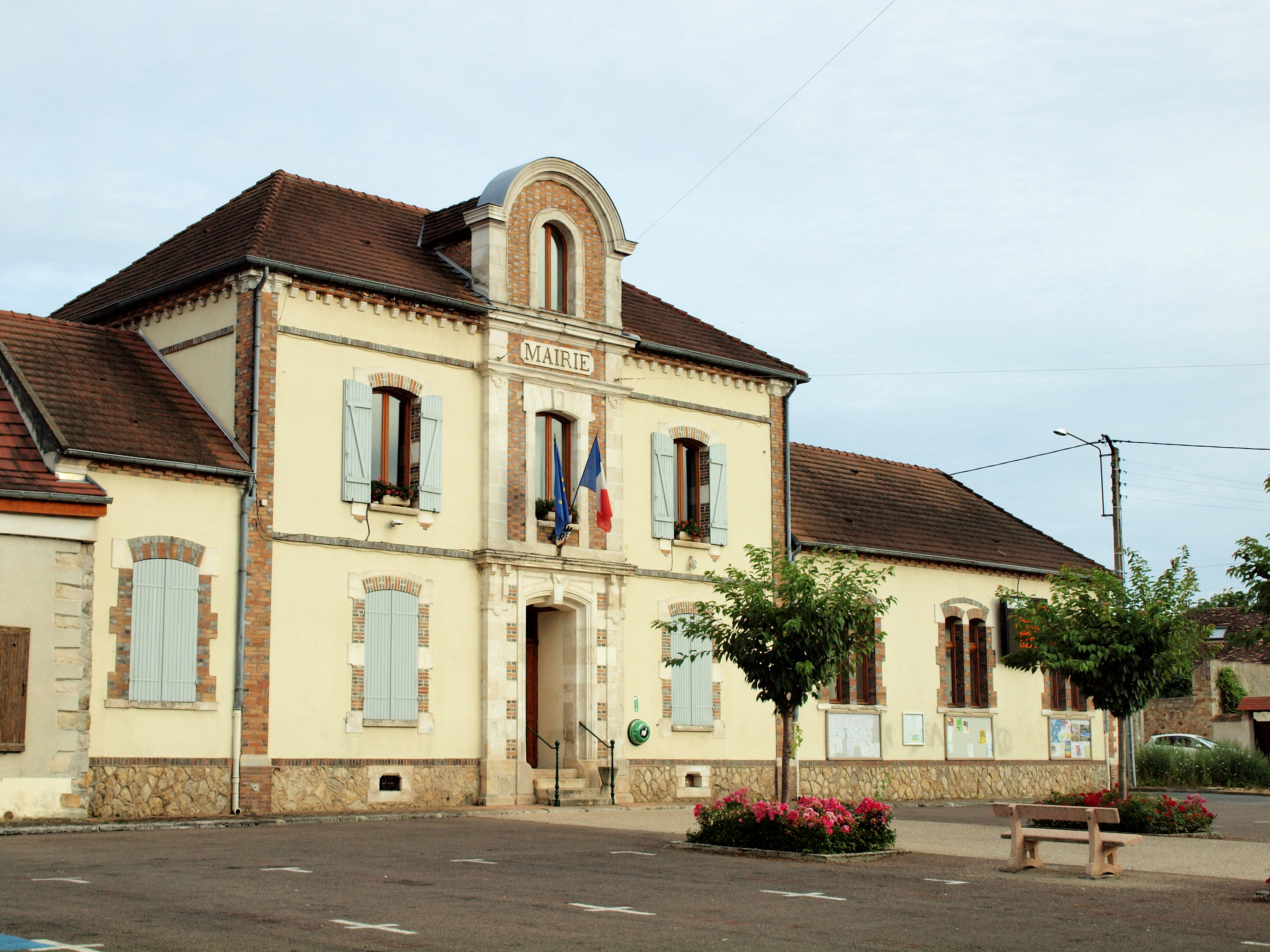 Mairie de Villeblevin (Yonne, France)